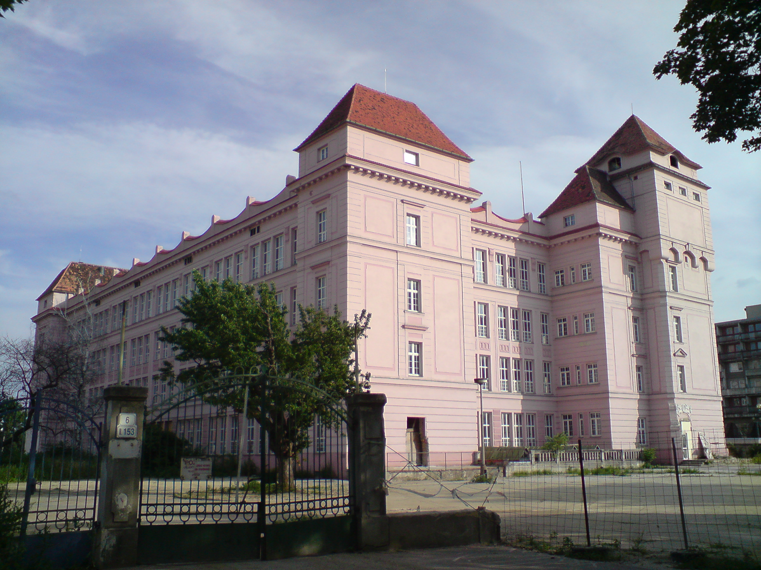 Cvernovka, stará pradiareň